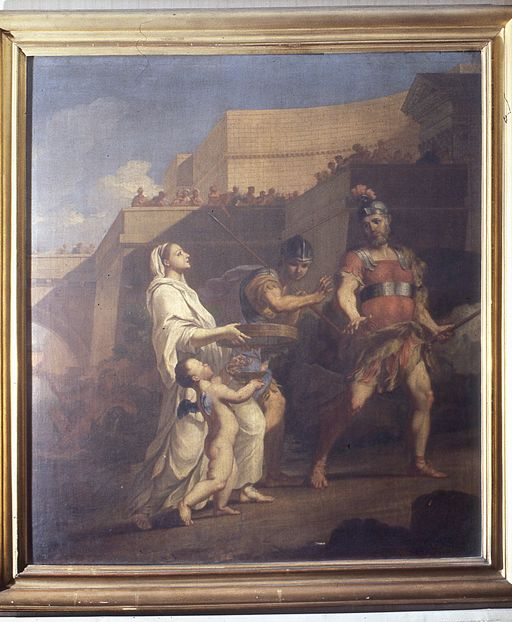 Tableau de Thomas Blanchet titré "Tuccia la vestale innocentée" ou "Le témoignage de Vénus". Réalisé en 1687. Accroché depuis l'origine au Palais de justice de Lyon, dans la salle de la cour d'appel. Huile sur toile. 150x100 cm.